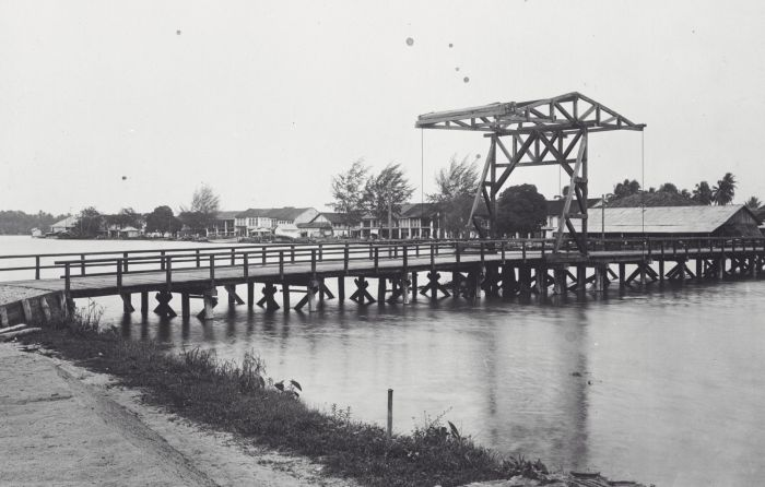 Foto. Brug over de Silau rivier bij Tandjoengbalai, die de stad met het spoorwegemplacement verbindt